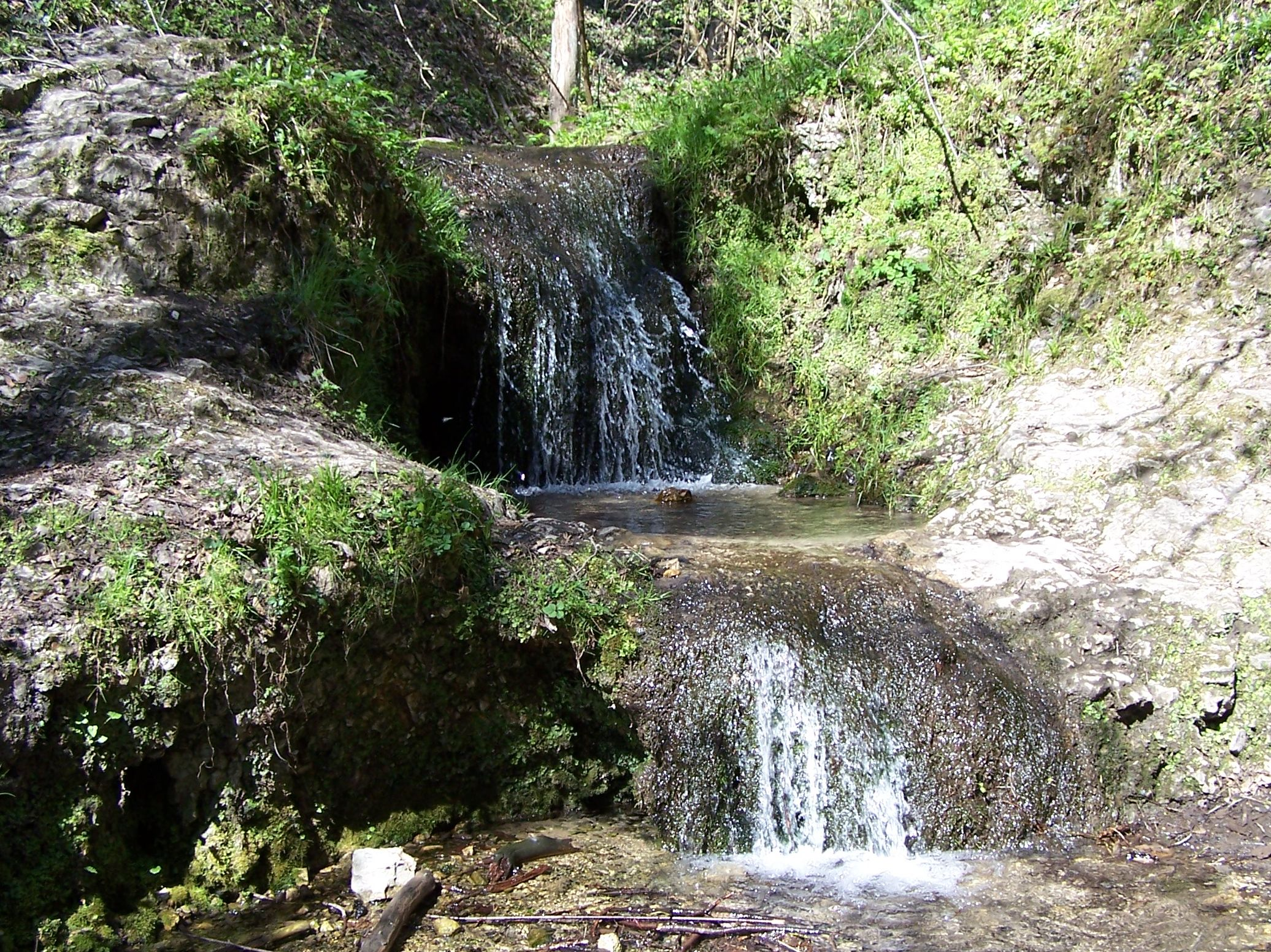 Bolechówka (Bolechowicka Valley)